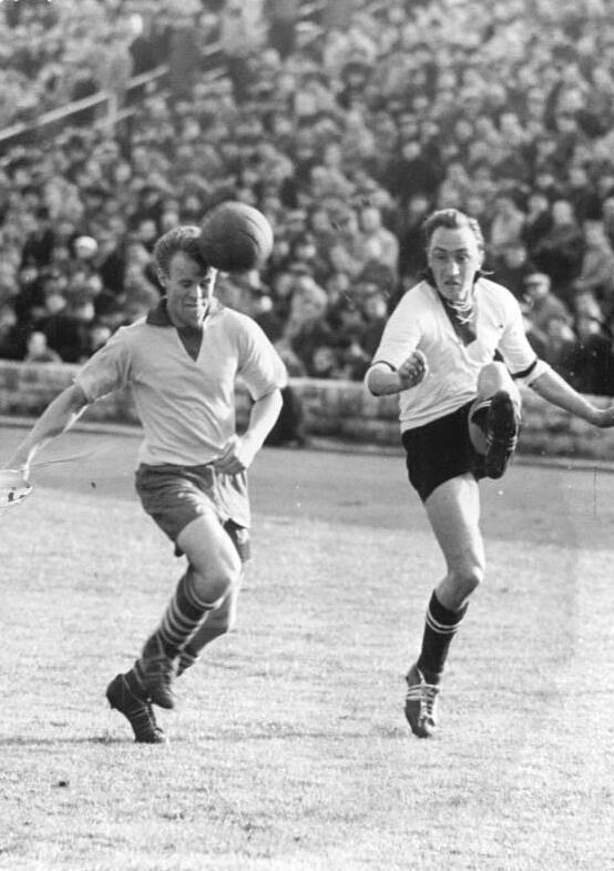 Zentralbild-Beyer Bey-krz 14.4.1957 Fußball-Punktspiel Vorwärts Berlin - Rotation Babelsberg - Am Sonntag, dem 14.4.1957, standen sich im Jahnsportpark in einem Oberliga-Punktspiel der Fußballer der ASK-Vorwärts Berlin und Rotation Babelsberg gegenüber. UBz: Der Babelsberger Stürmer Giessler I (rechts) flankt vor dem Vorwärts-Läufer Küchler den Ball zur Mitte.